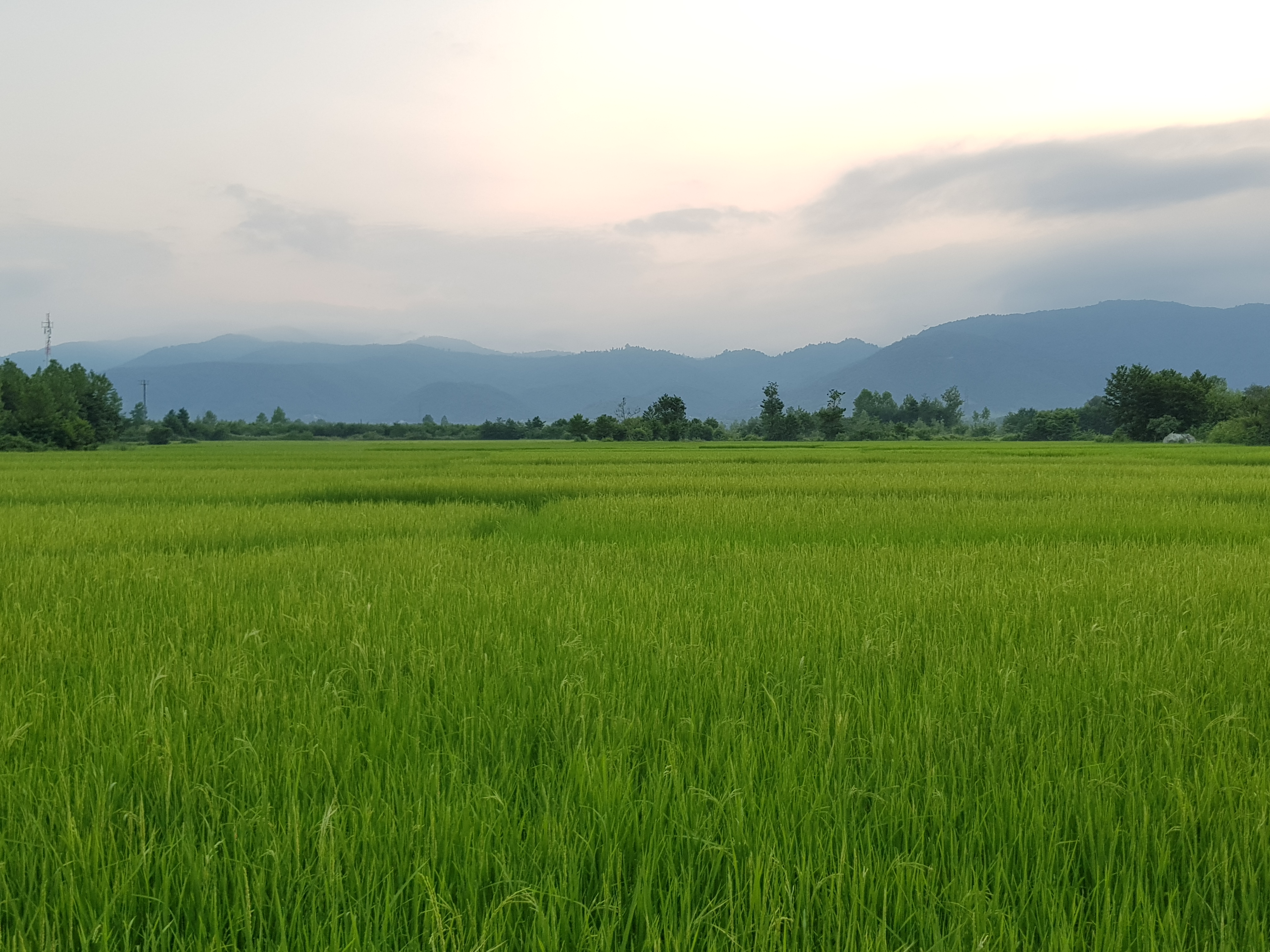 مزارع برنج در روستای شیخ نشین